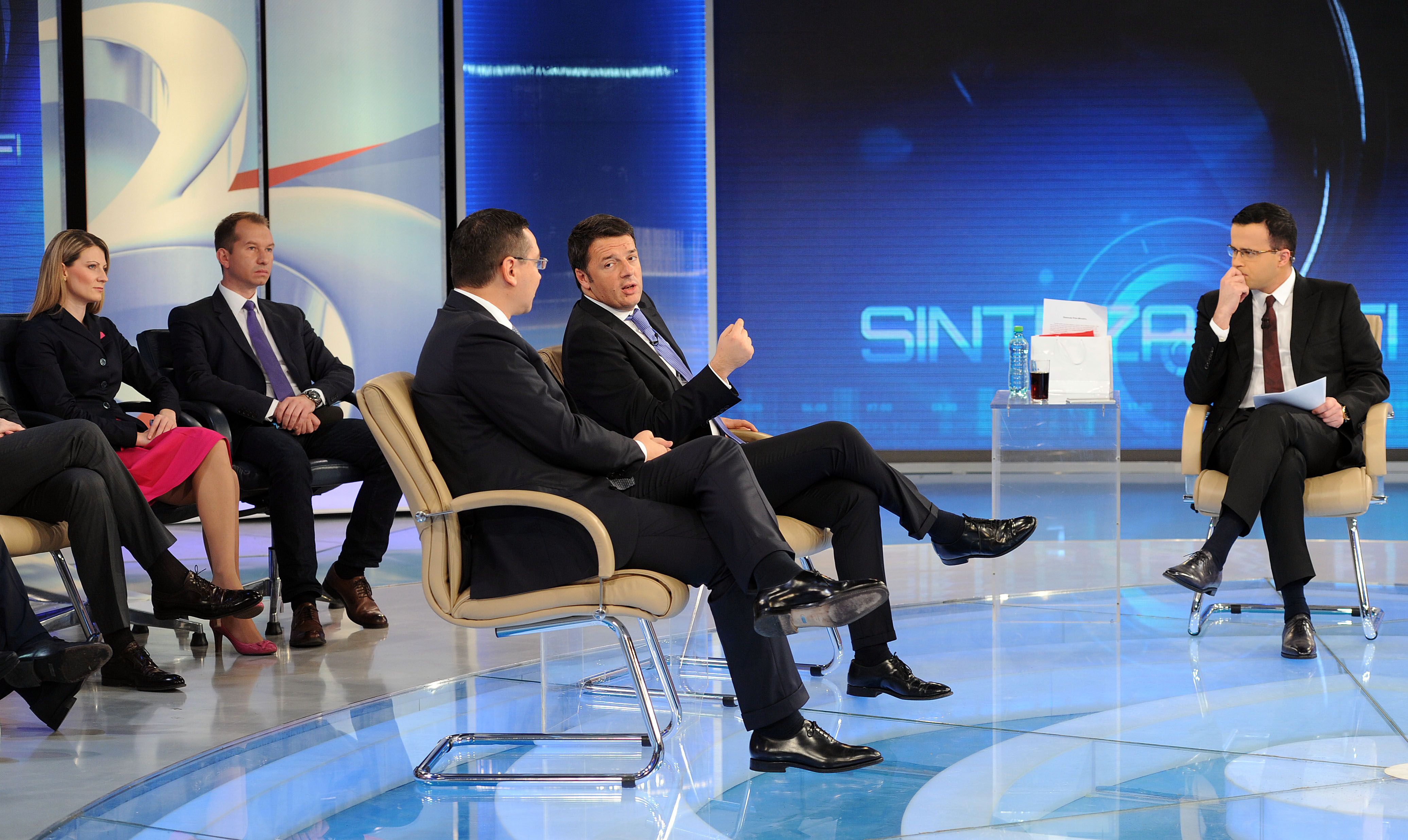 Victor Ponta la dezbaterea de la Antena 3 - 13.11 (5)